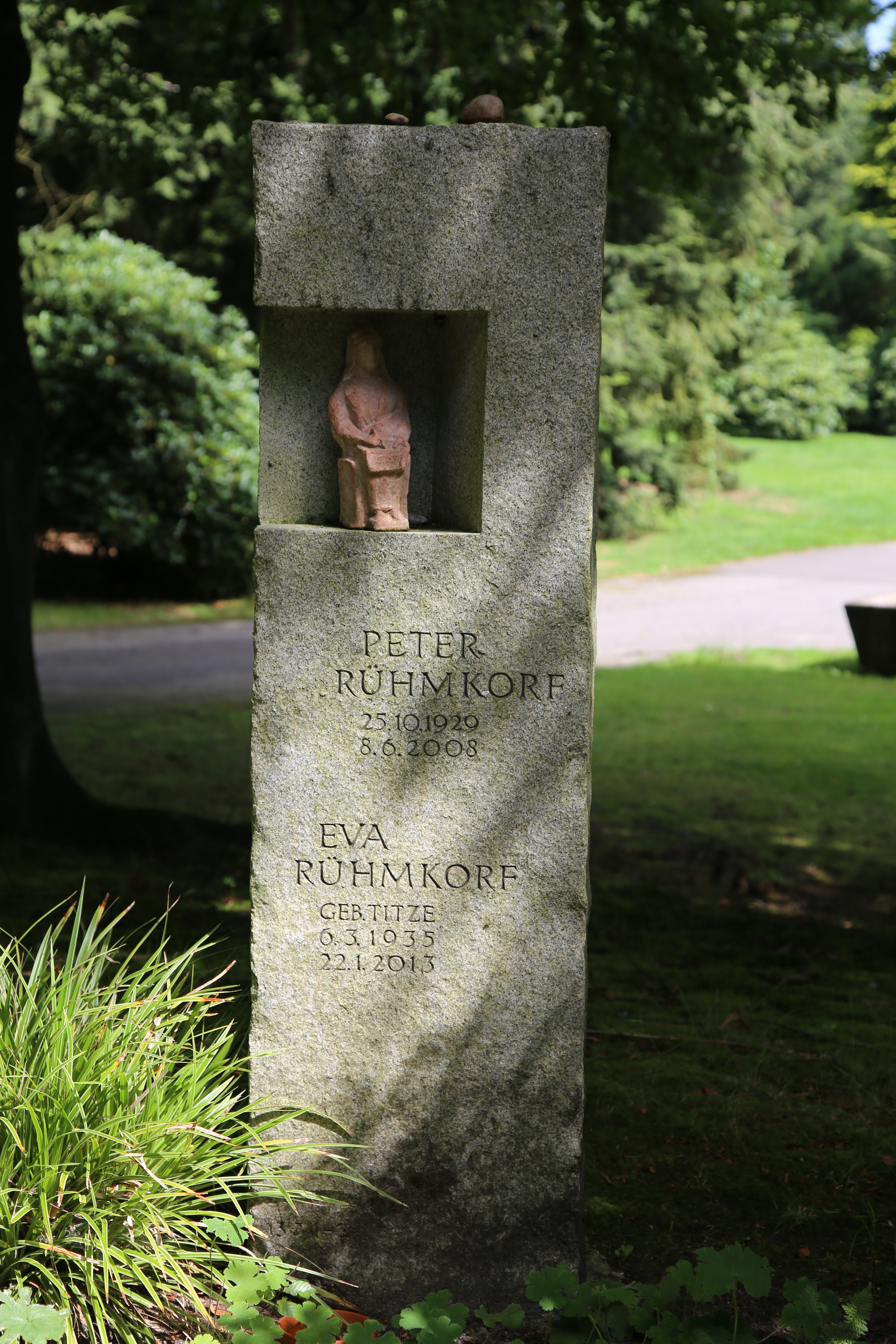 Grabmal von Peter Rühmkorf und Eva Rühmkorf auf dem Altonaer Hauptfriedhof